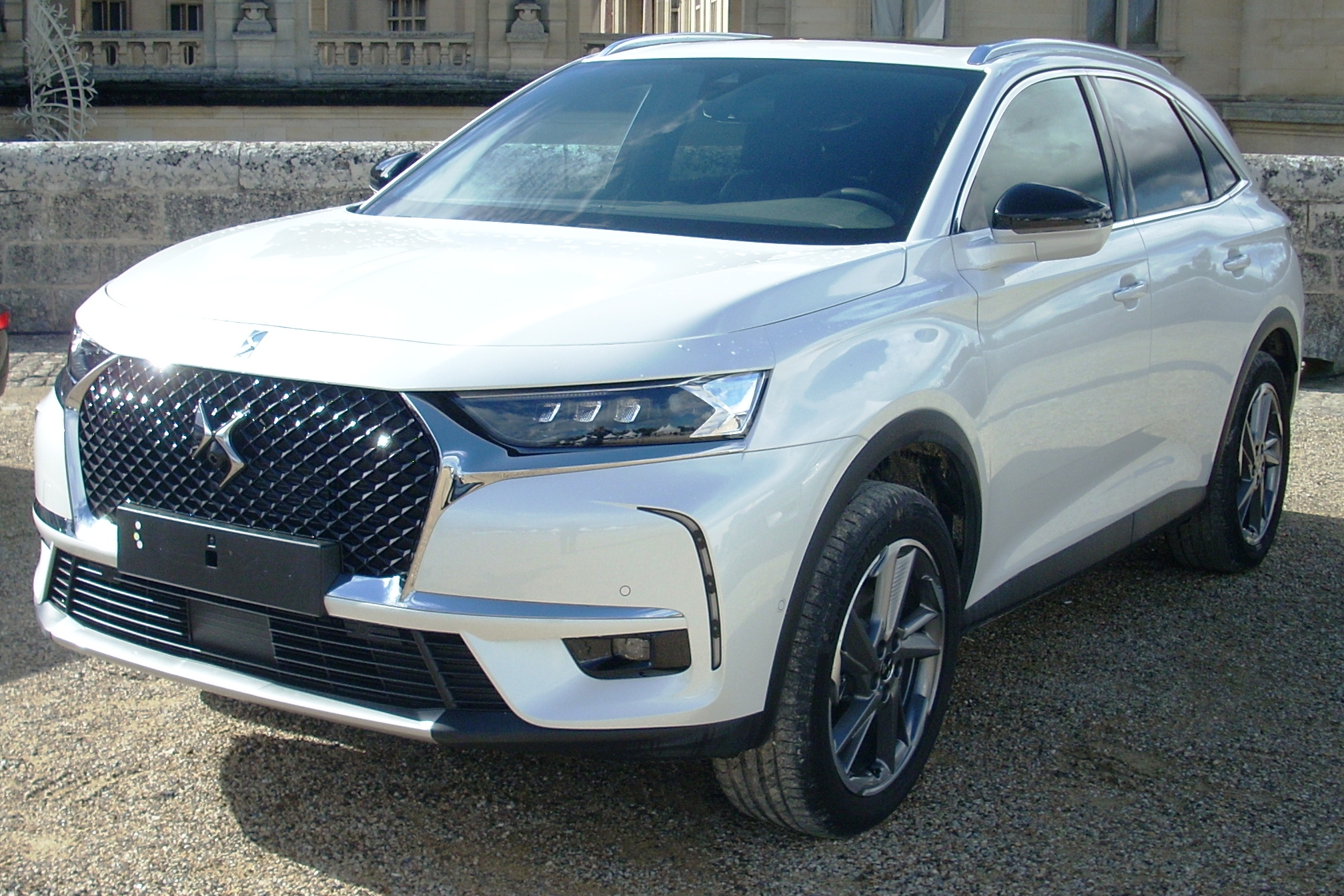 DS 7 Crossback au Chantilly Arts & Elegance Richard Mille 2017